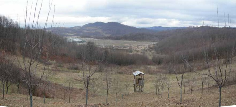 Поглед на коп рудника угља "Угљевик" и брда Мајевице из села Тобута.